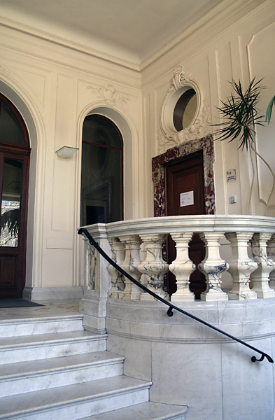 Eingangsbereich der Villa Post